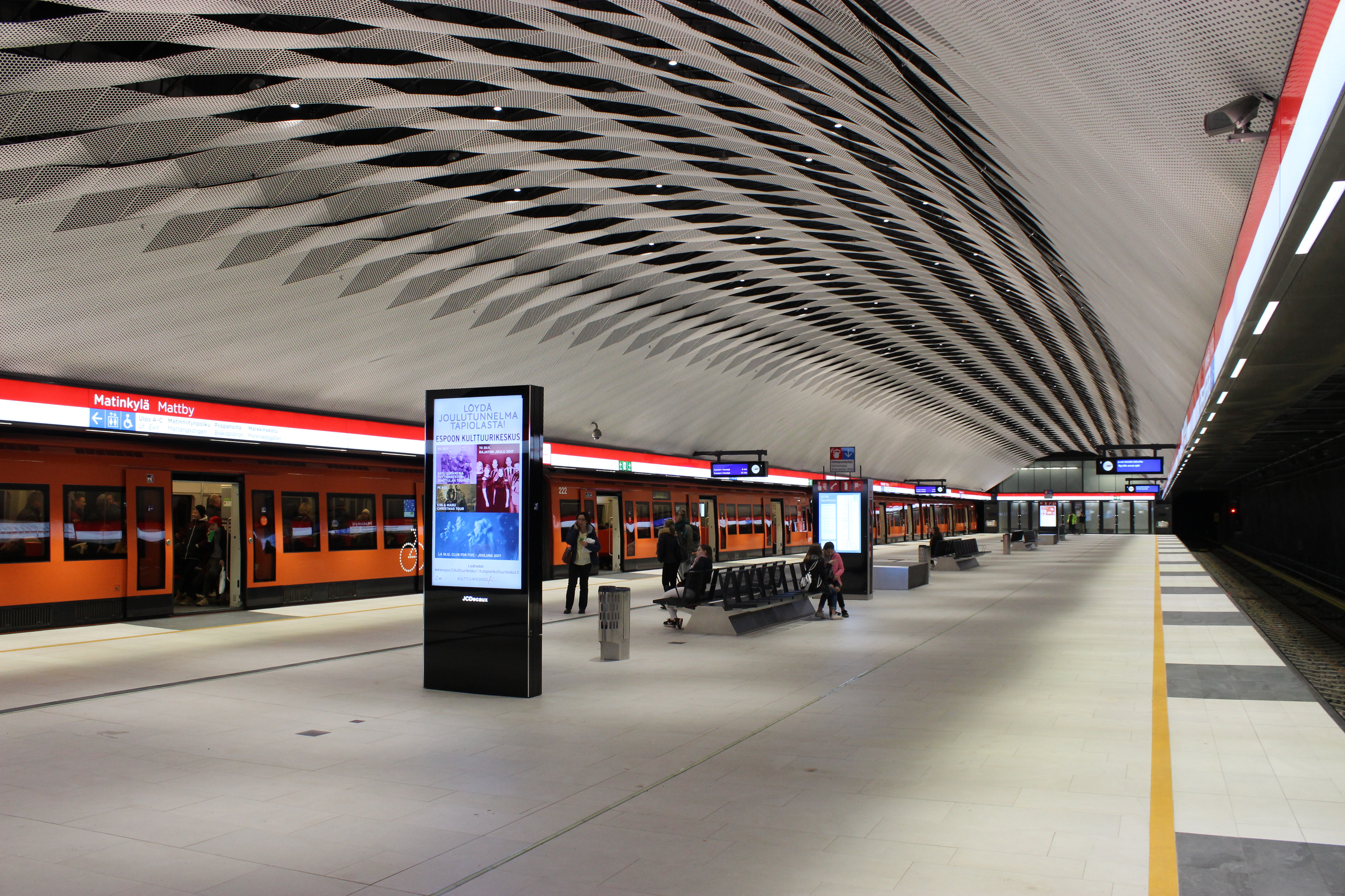 Matinkylän metroasema marraskuussa 2017.